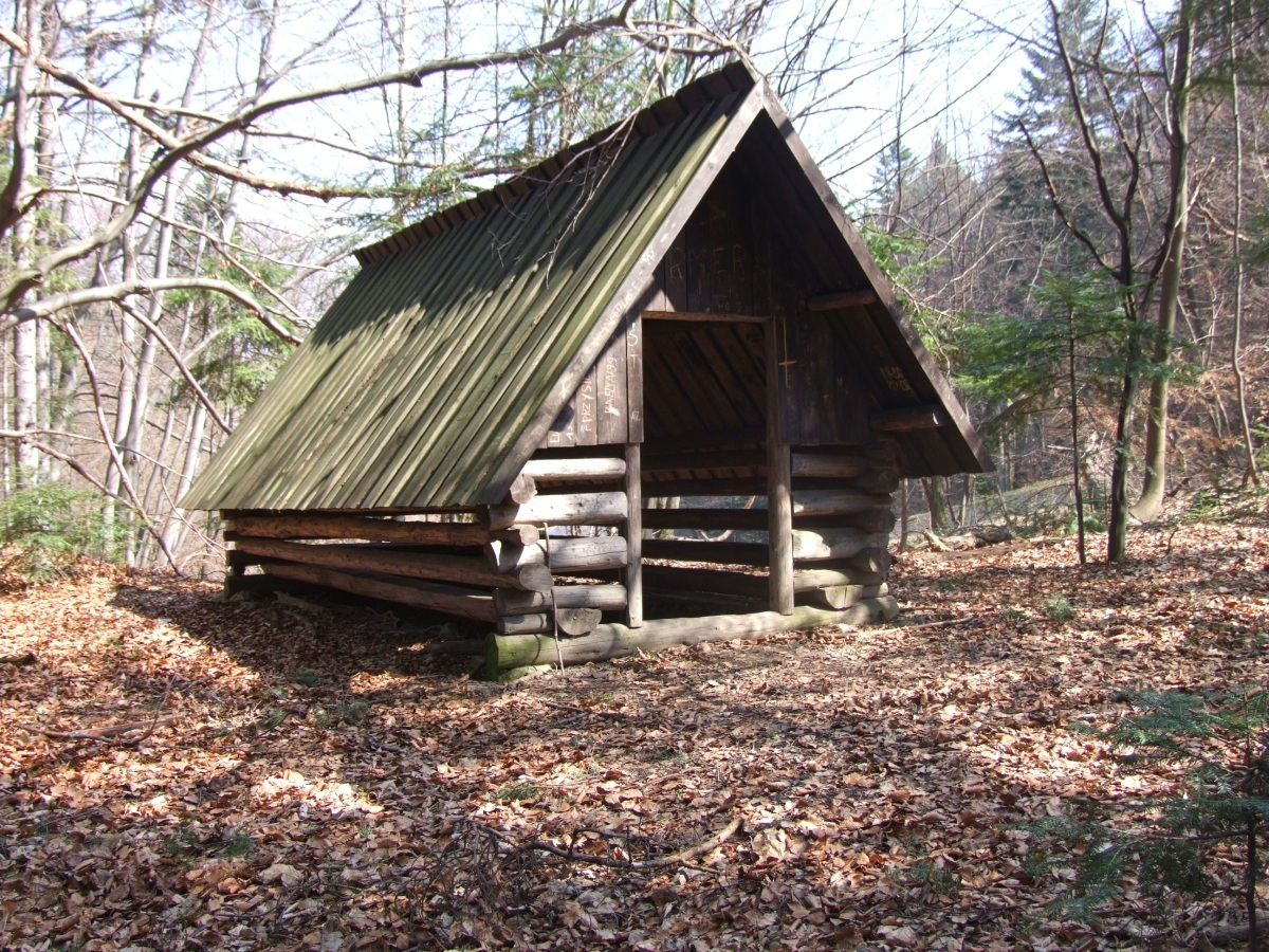 Wiata dla turystów na przełęczy Burzana w Pieninach